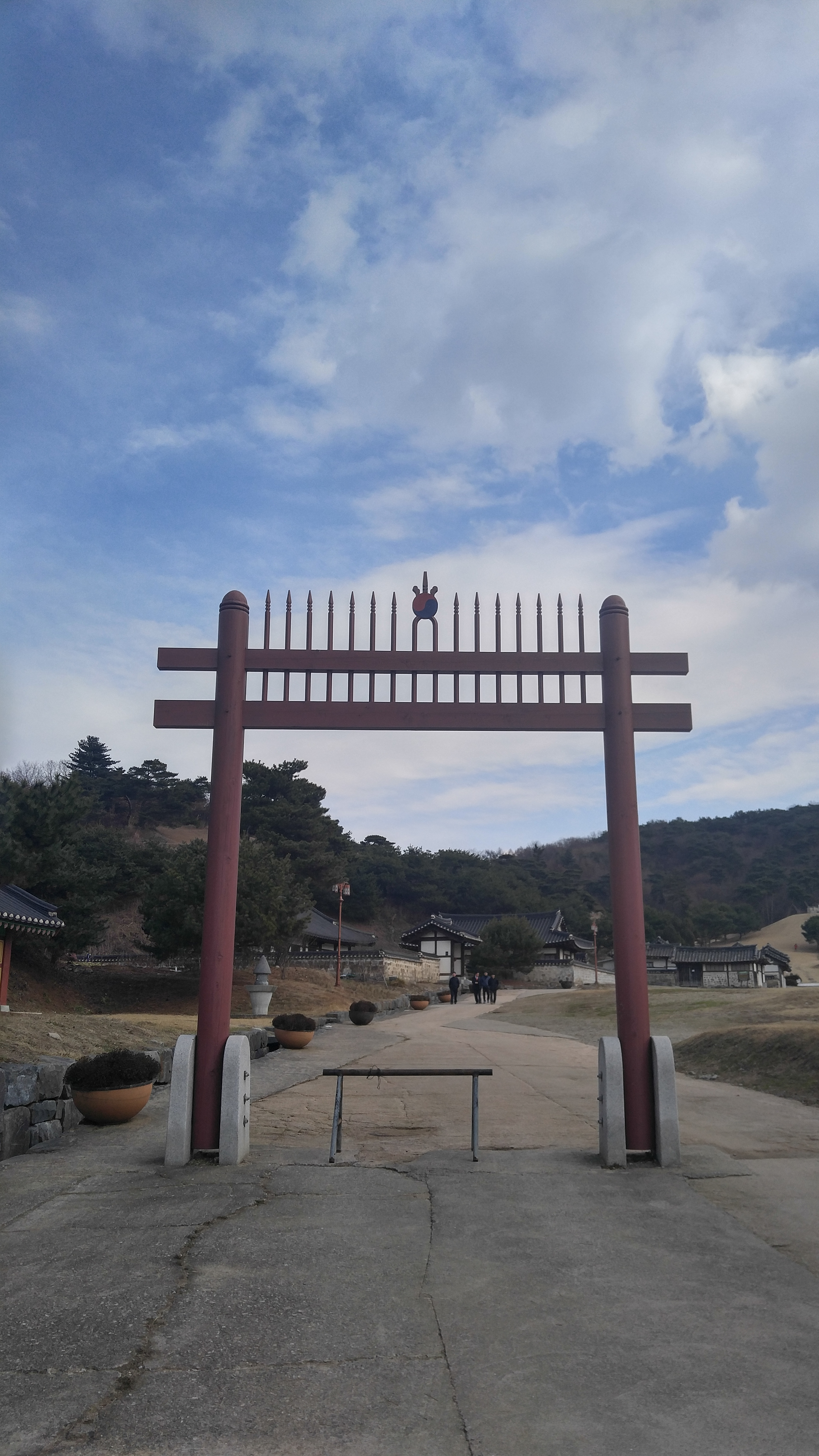 경기도문화재 묘 - 홍살문